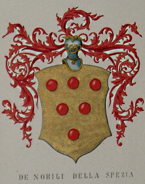 Blason de la famille "Nobili de Vezzano" installée à La Spezia, Ligurie, Italie